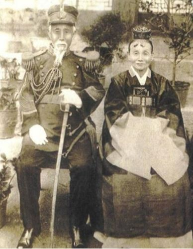 1927년 윤영렬 & 한진숙 회혼례, 윤영렬(윤보선의 조부, 윤치호의 숙부)